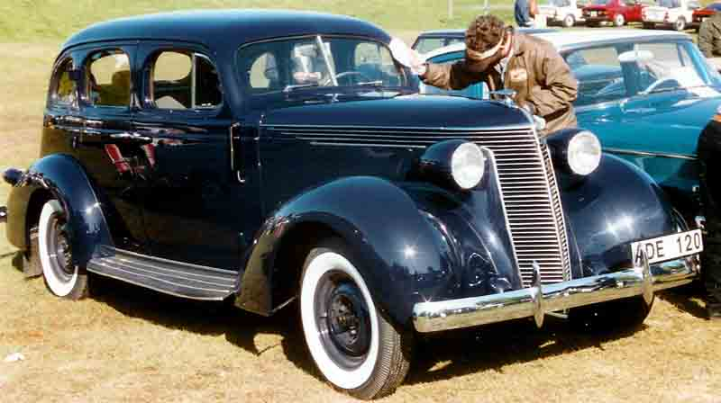 Studebaker Dictator 4-Door Sedan 1937